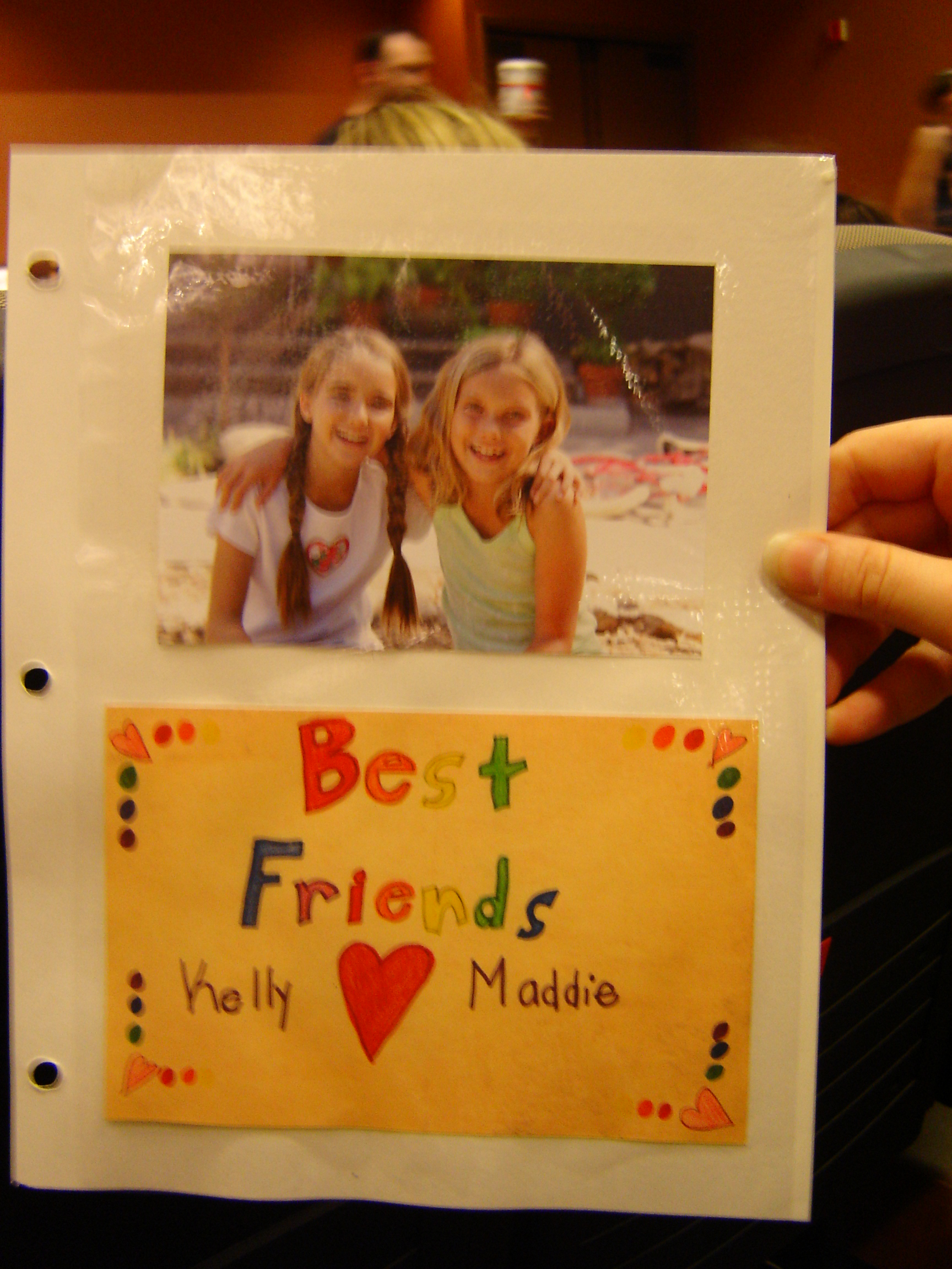 Requiem